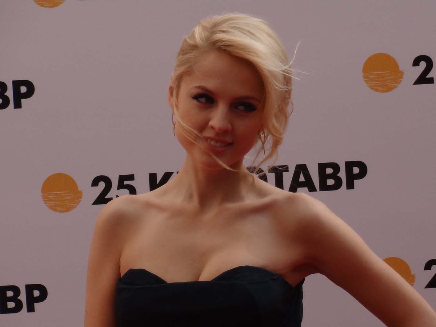 Янина Сергеевна Студилина — российская актриса театра и кино, фотомодель, телеведущая. Церемония открытия фестиваля "Кинотавр -2014" в Сочи.